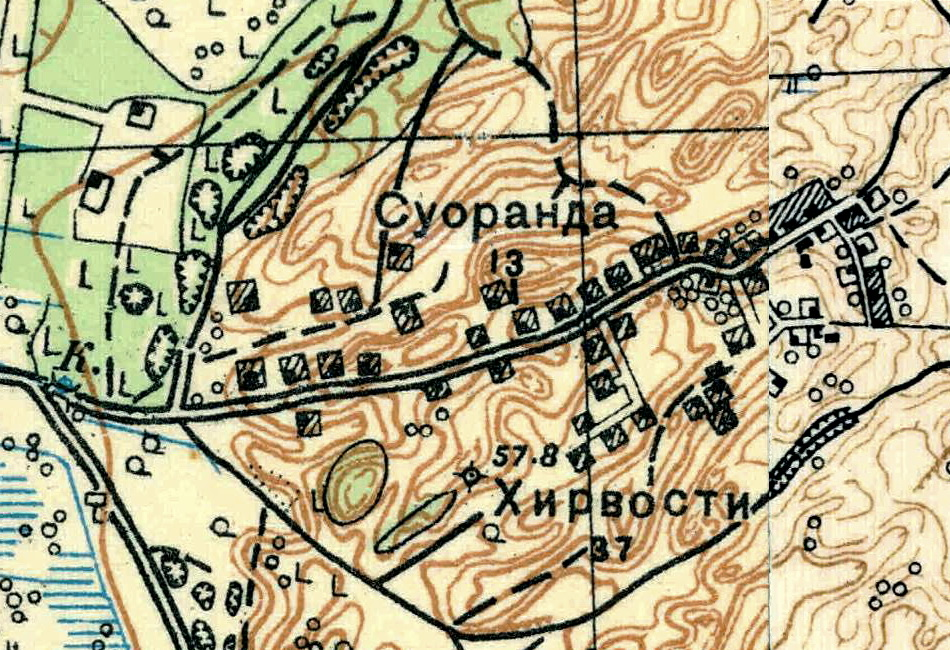 Топографическая карта Ленинградской области, квадрат О-36-2-А-а (сл. Ржевская), деревни Суоранда и Хирвости